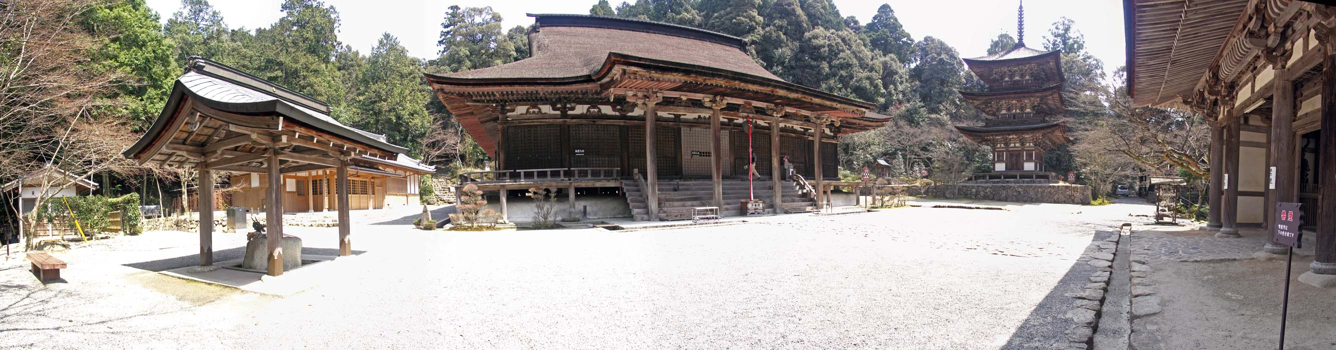 Saimyouji temple , 西明寺